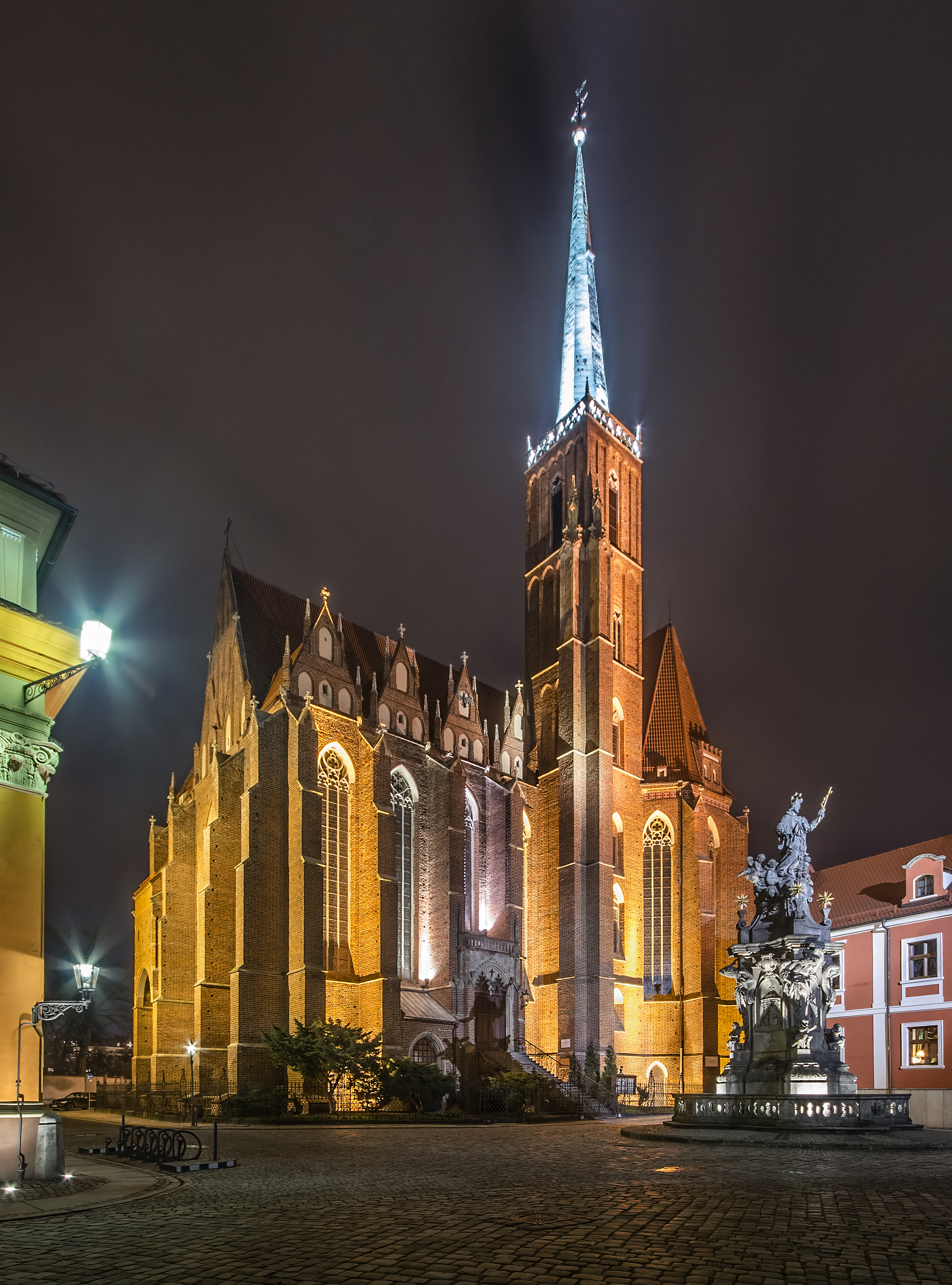 Wrocław, katedra obrządku greckokatolickiego wraz z kaplicą Mariacką (Hochberga), dawny Kościół św. Jakuba i Wincentego, XIII/XIV